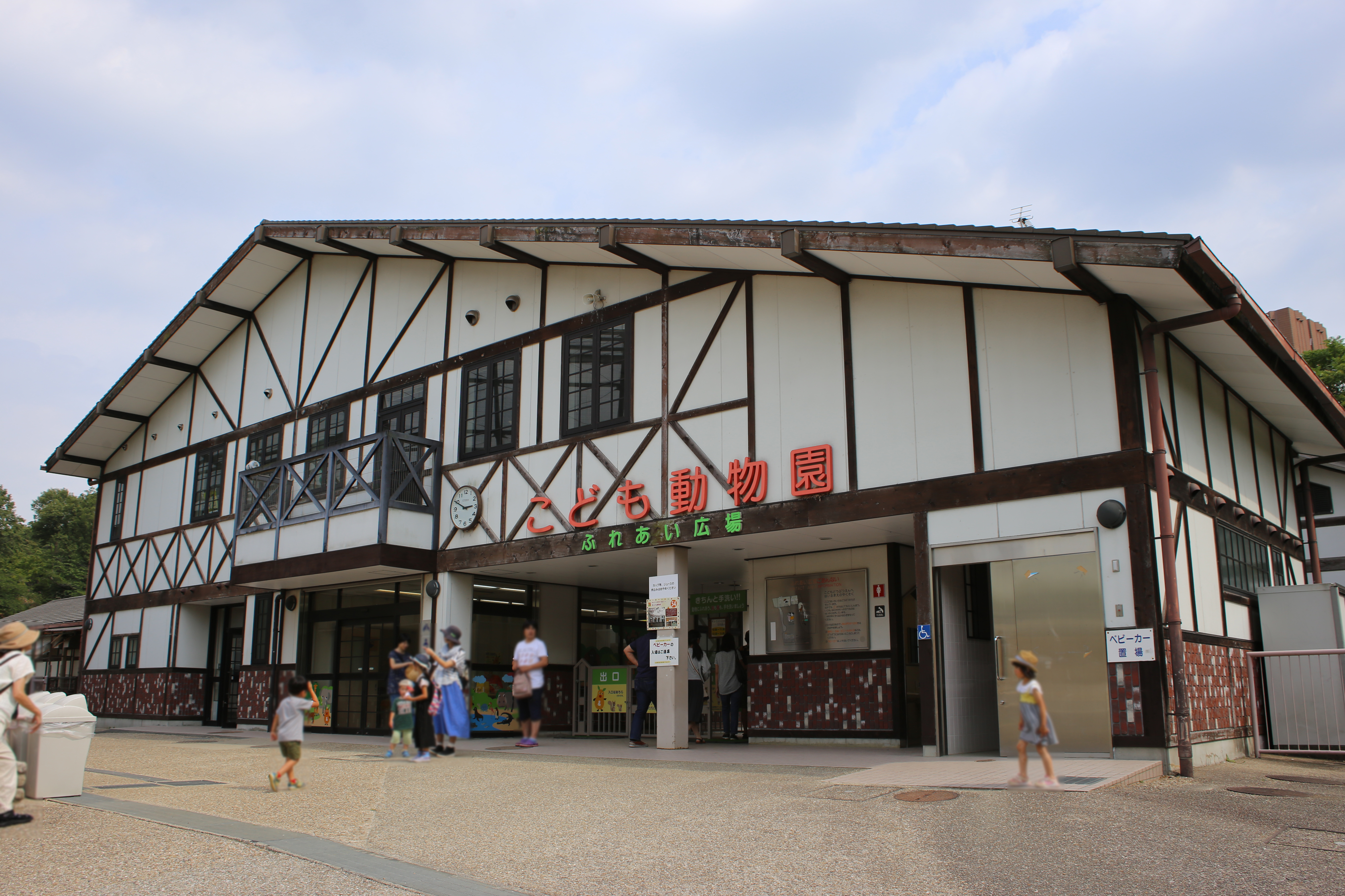 名古屋市千種区の名古屋市東山動植物園内こども動物園